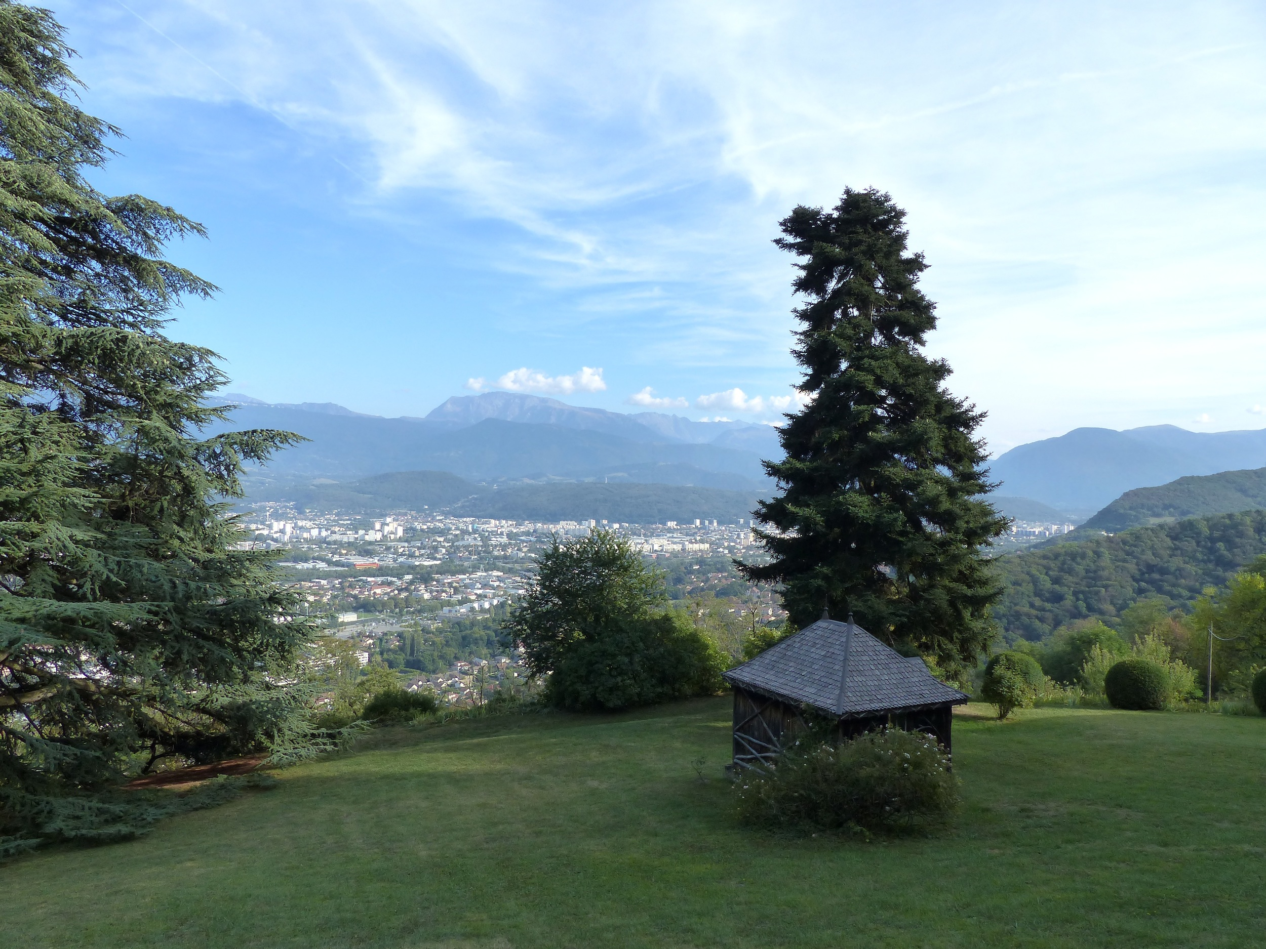 Panorama depuis le parc du château de Beauregard (Seyssinet-Pariset)